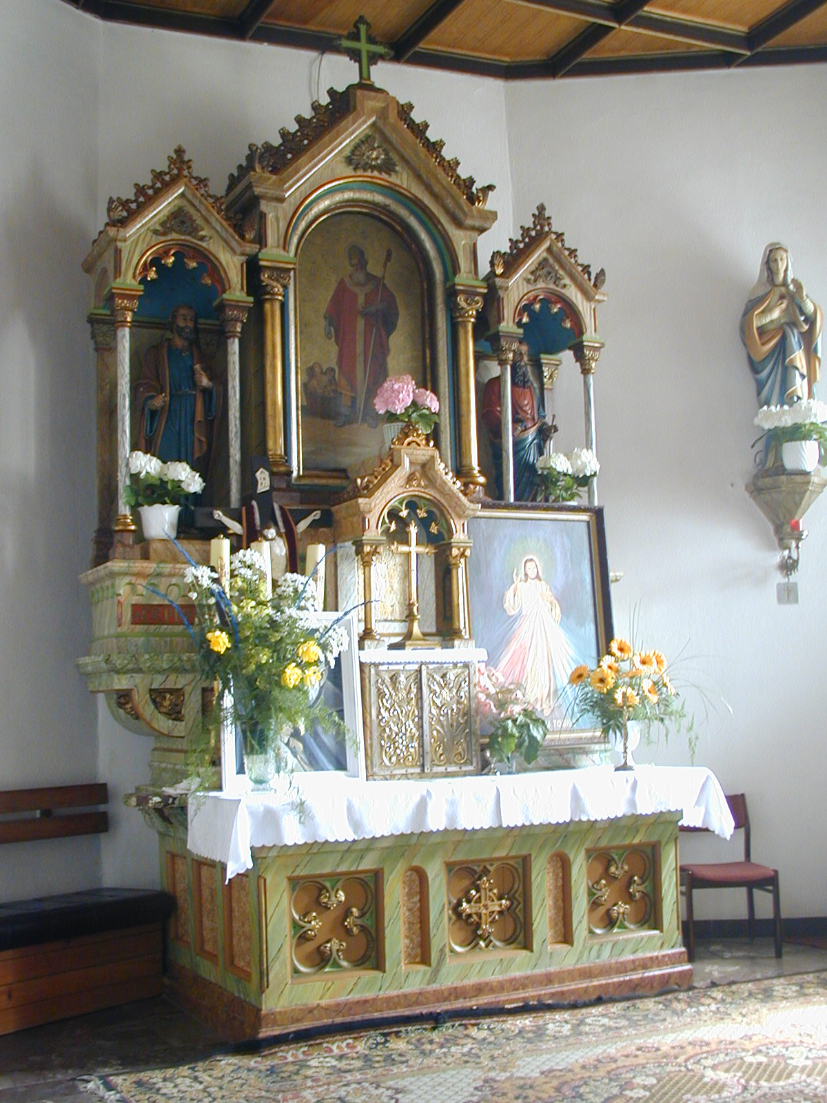 Ołtarz kościoła św. Mikolaja w kozłowie, Polska